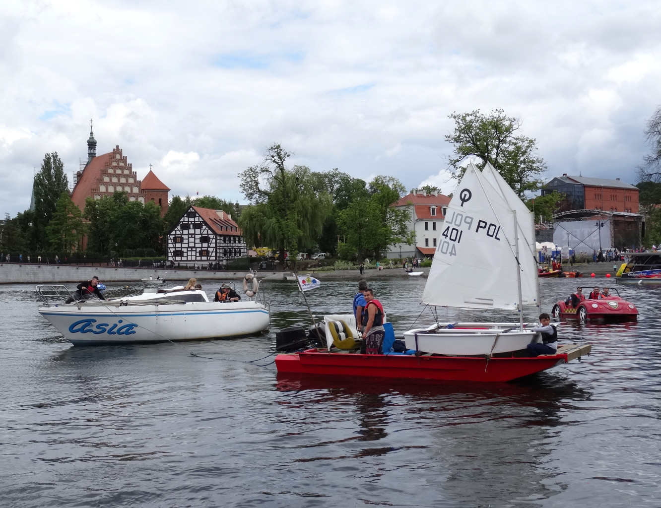 Bydgoski Festiwal Wodny Ster na Bydgoszcz 2015. Zakole Brdy w centrum miasta